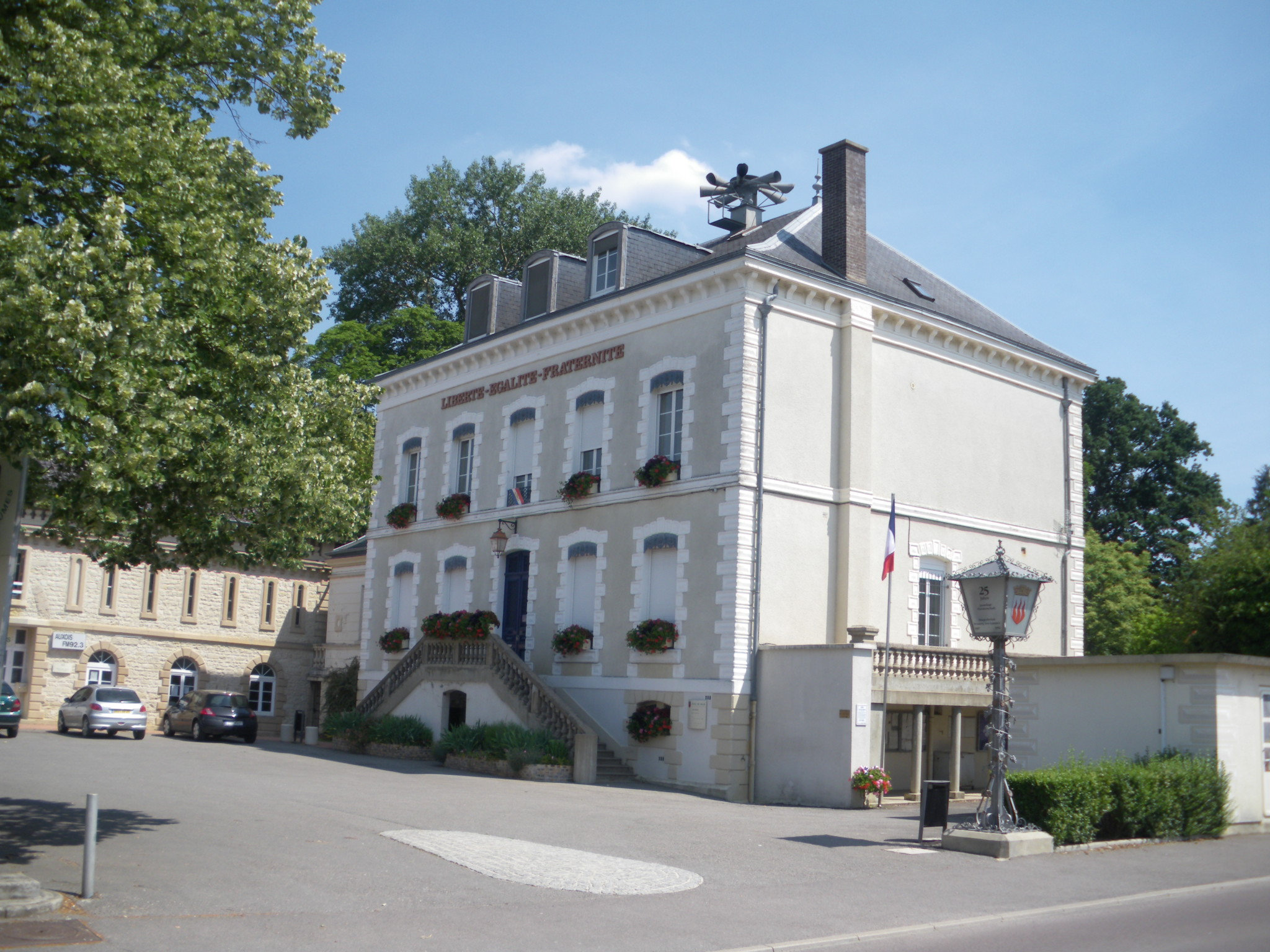 Venarey les Laumes (Côte d'Or) la Mairie